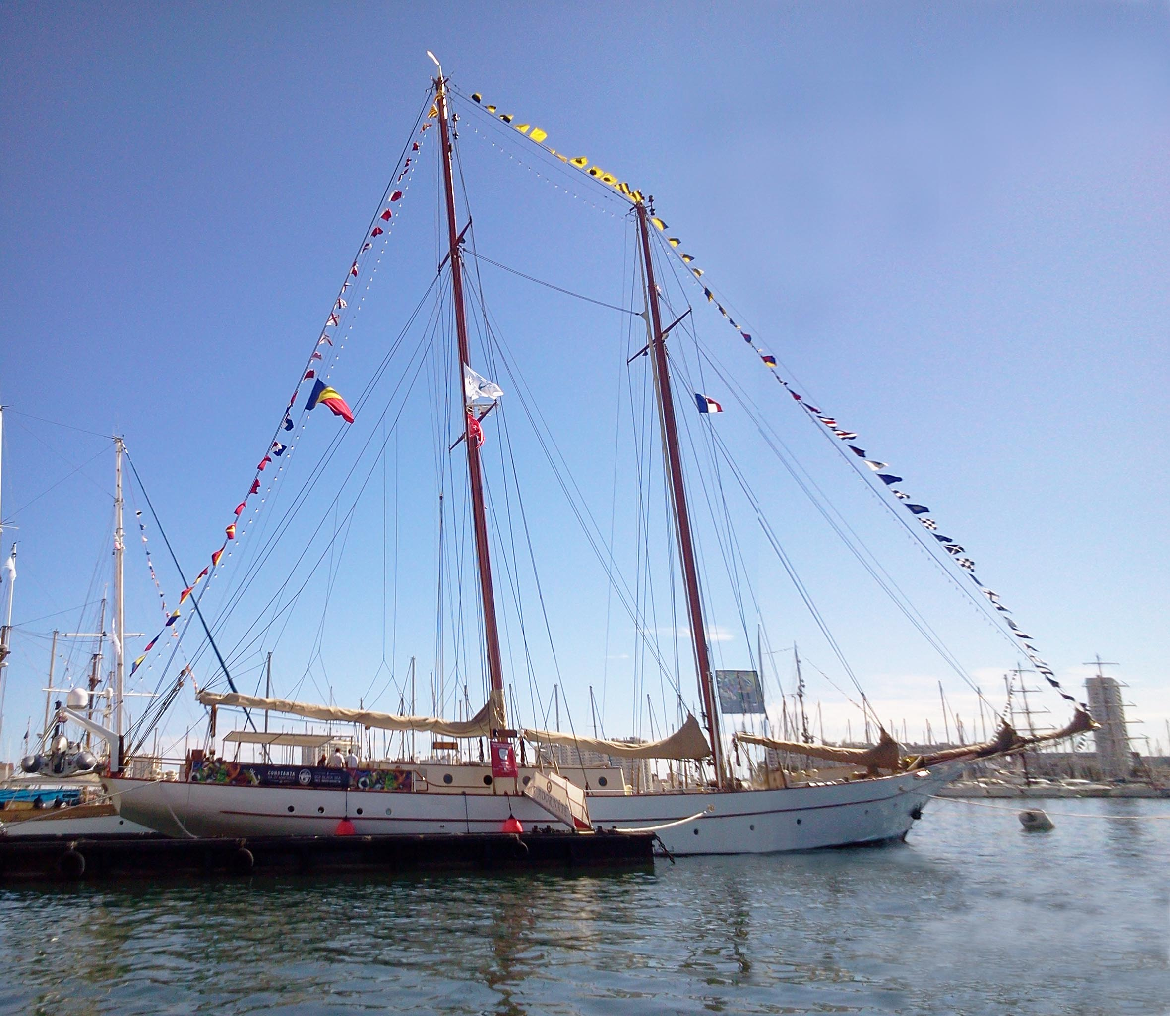 Goeleta românească "Adornate" la Toulon, 29 sept. 2013